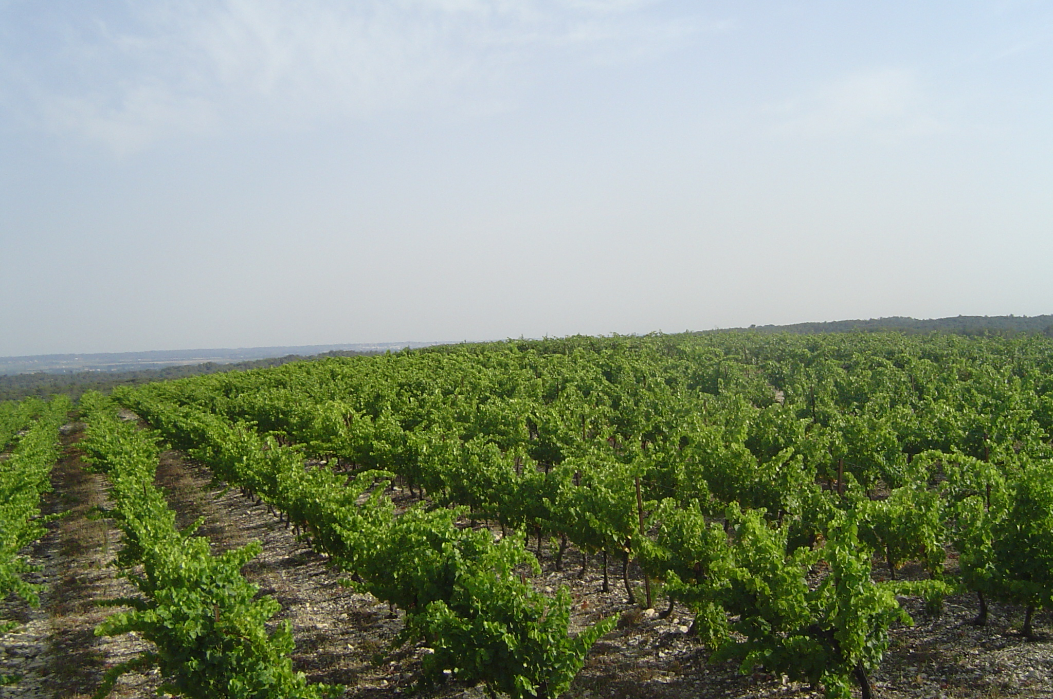 Vignes situées à Langlade, sur le domaine du Château Langlade ; photo personnelle de Nicolas Cadène, 14/10/2006, reproduction identique autorisée sur Wikipedia